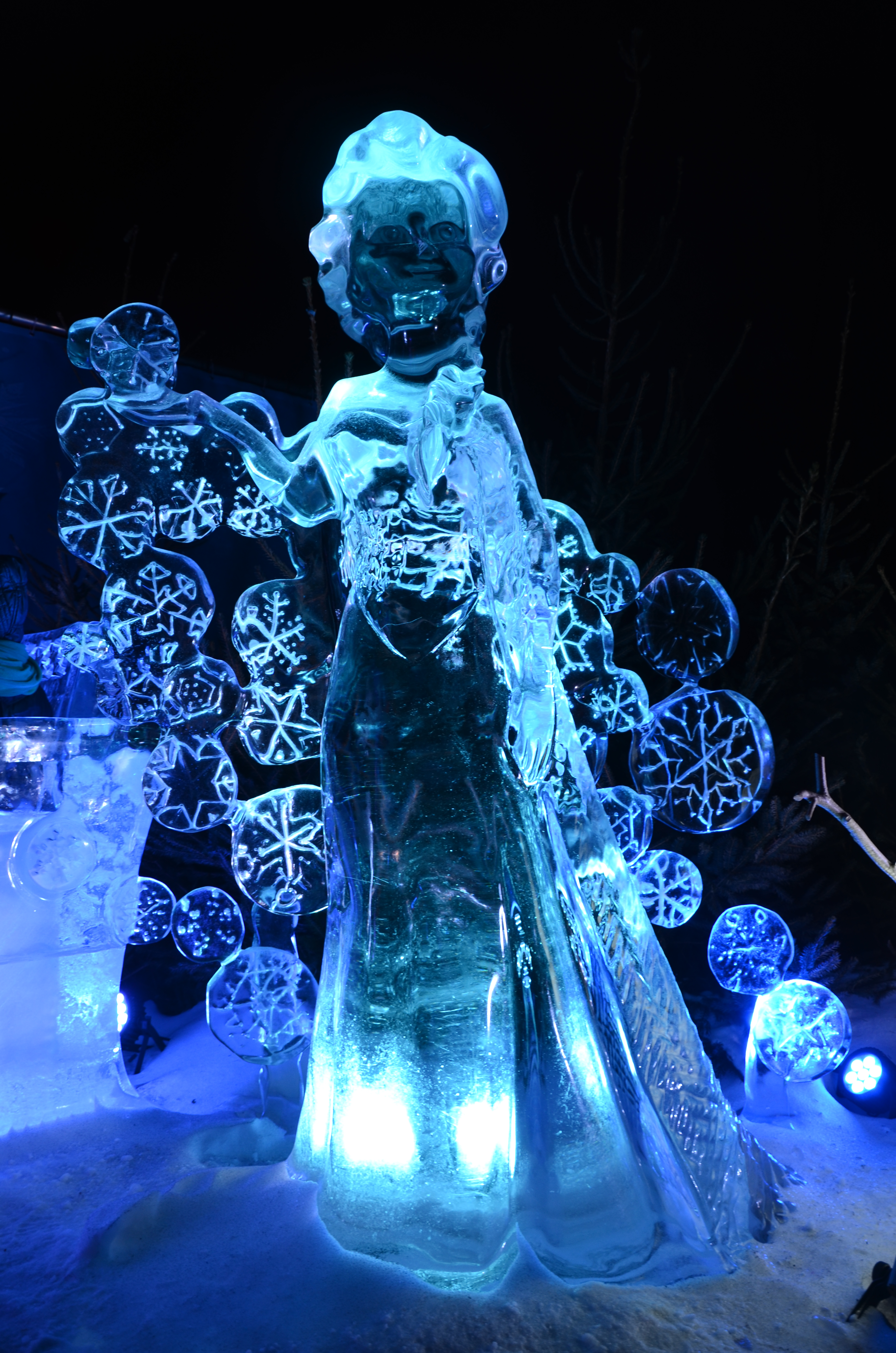 IJssculptuur van een personage uit de Disneyfilm Frozen op het IJsbeeldenfestival in Zwolle.